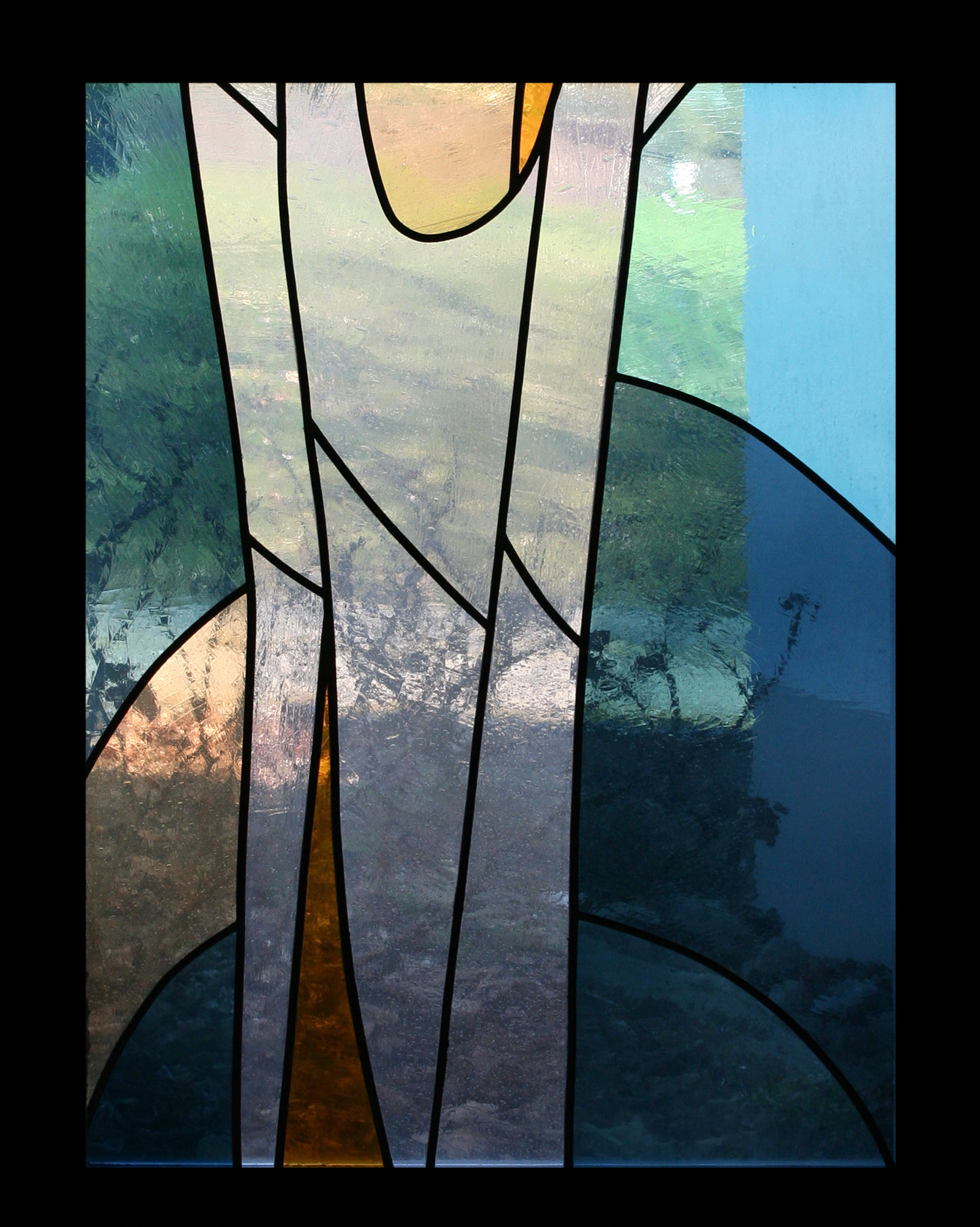 Römisch-katholische Kirche St. Josef Rickenbach-Sulz, Glasfenster von Jacques Schedler